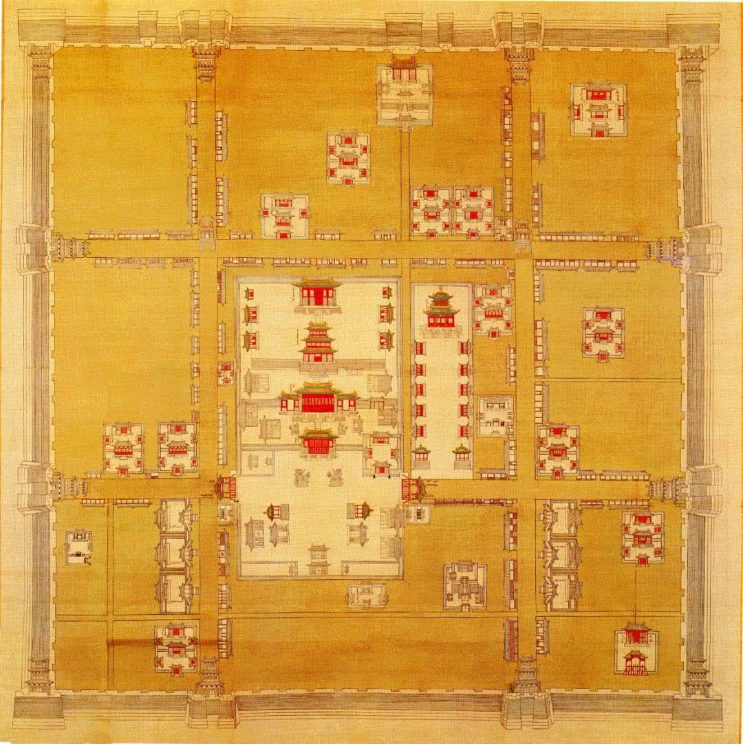 盛京城阙图，藏中国第一历史档案馆